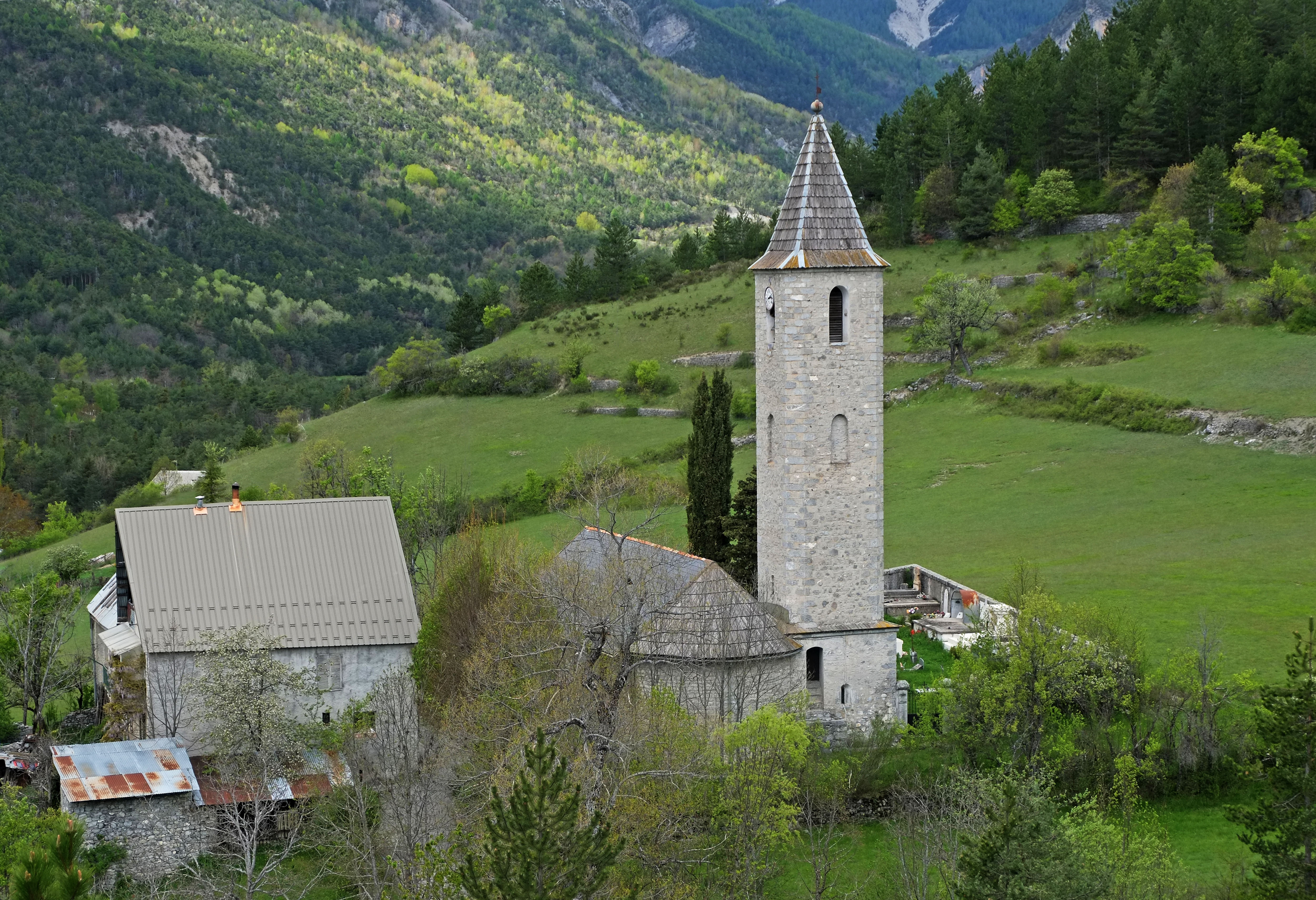 Vue de l'ancienne église de Villeneuve-d'Entraunes en grimpant vers Bantes